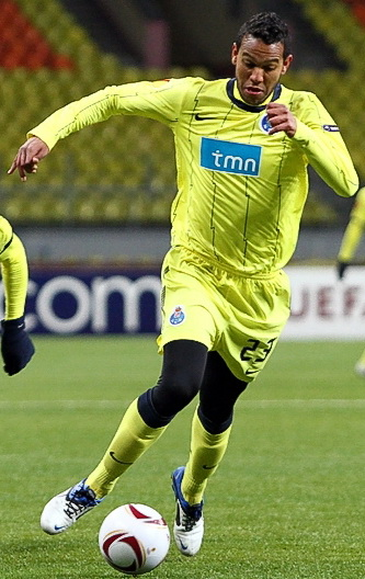 Жозеф де Соуза Диас